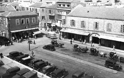 Hamra square - Haifa. it was the transportation hub of Haifa and the gate to Kasbah כיכר חמרה הייתה כיכר בצורת מלבן בעיר התחתית של חיפה תחילתה בבתקופה העות'מאנית. הכיכר התפתחה בצמוד לשער המערבי של "חיפה החדשה" שהייתה בין החומות. הכיכר שימשה כמרכז הפעילות של העיר הכיכר בשנת 1934 ללא אוטובוסים. התנועה בכיכר נגד כוון השעון מימין לשמאל